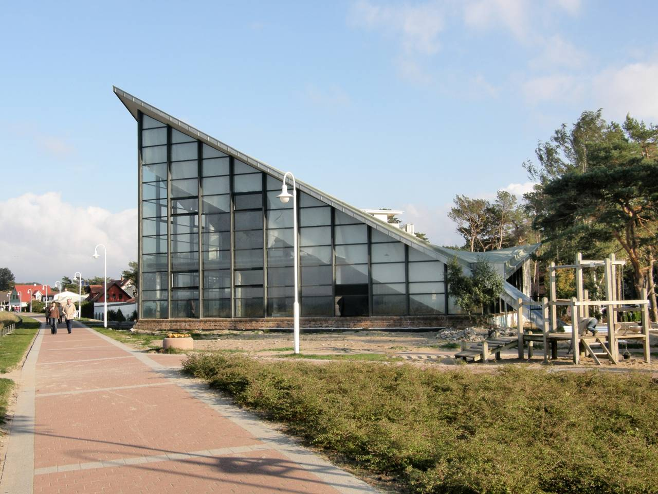 Restaurant "Ostseeperle" in Glowe von Ulrich Müther